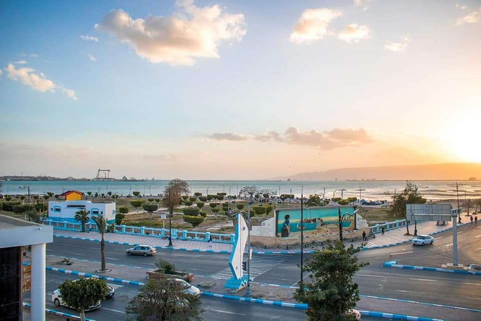 احد ميادين مدينة السويس